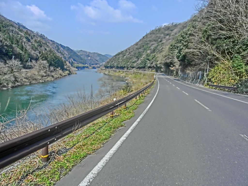 島根県の江の川